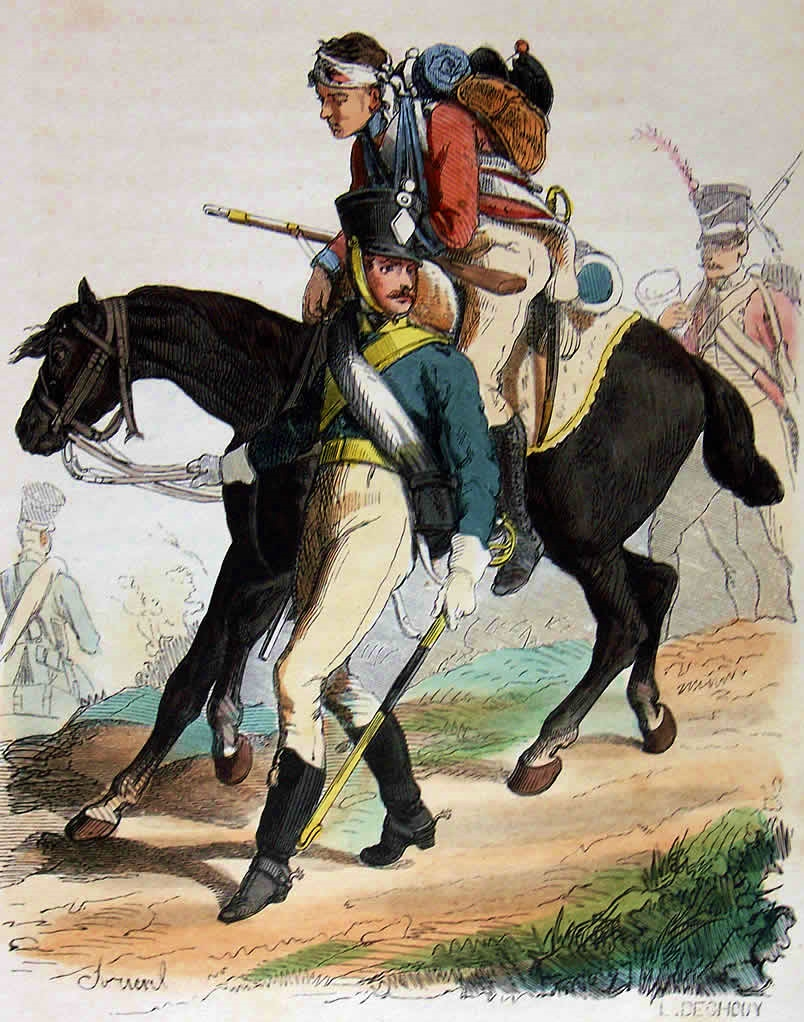 Légion hanovrienne, infanterie et cavalerie, 1804-1811.